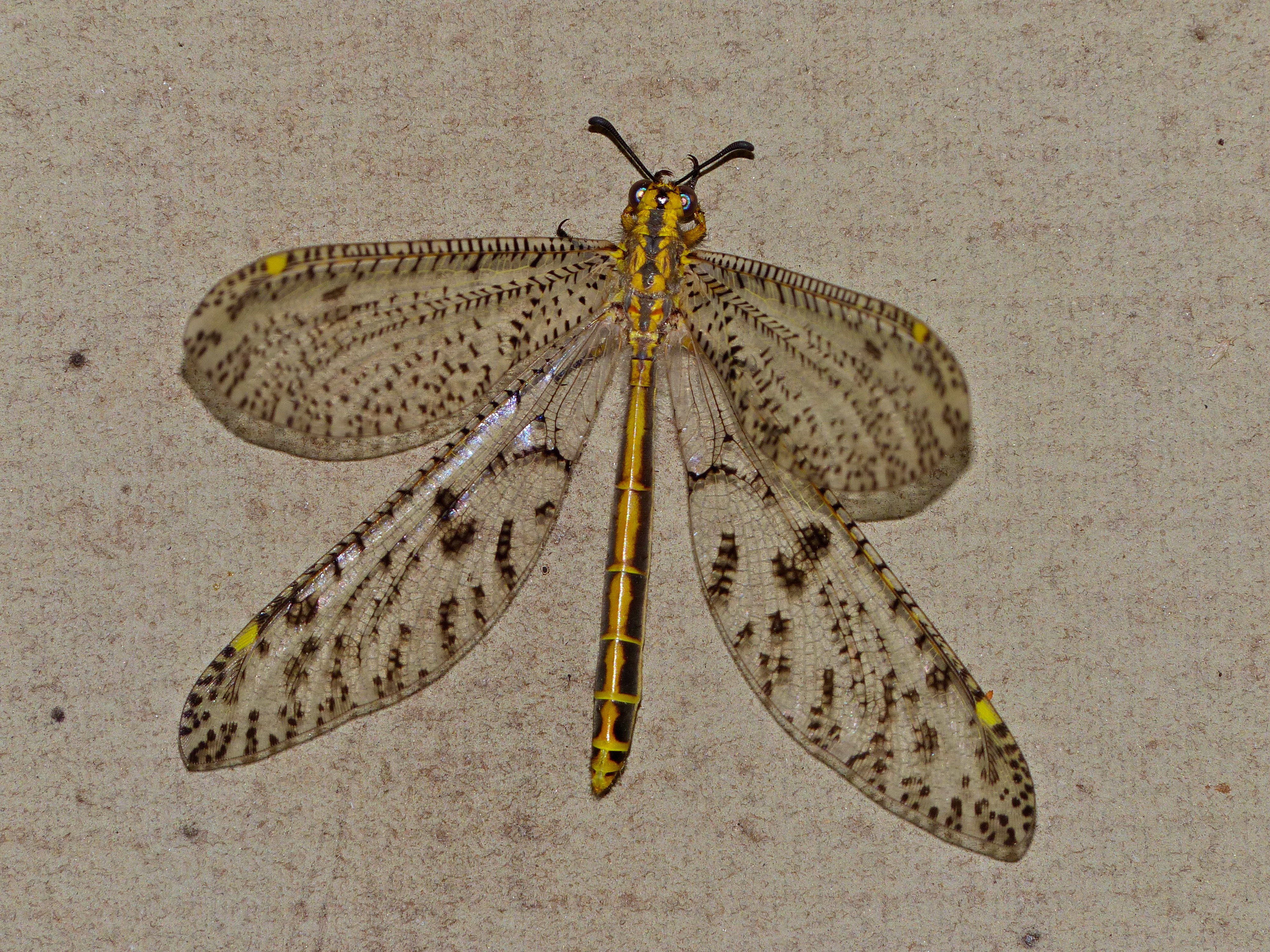 Lower Sabie Camp, Kruger NP, SOUTH AFRICA